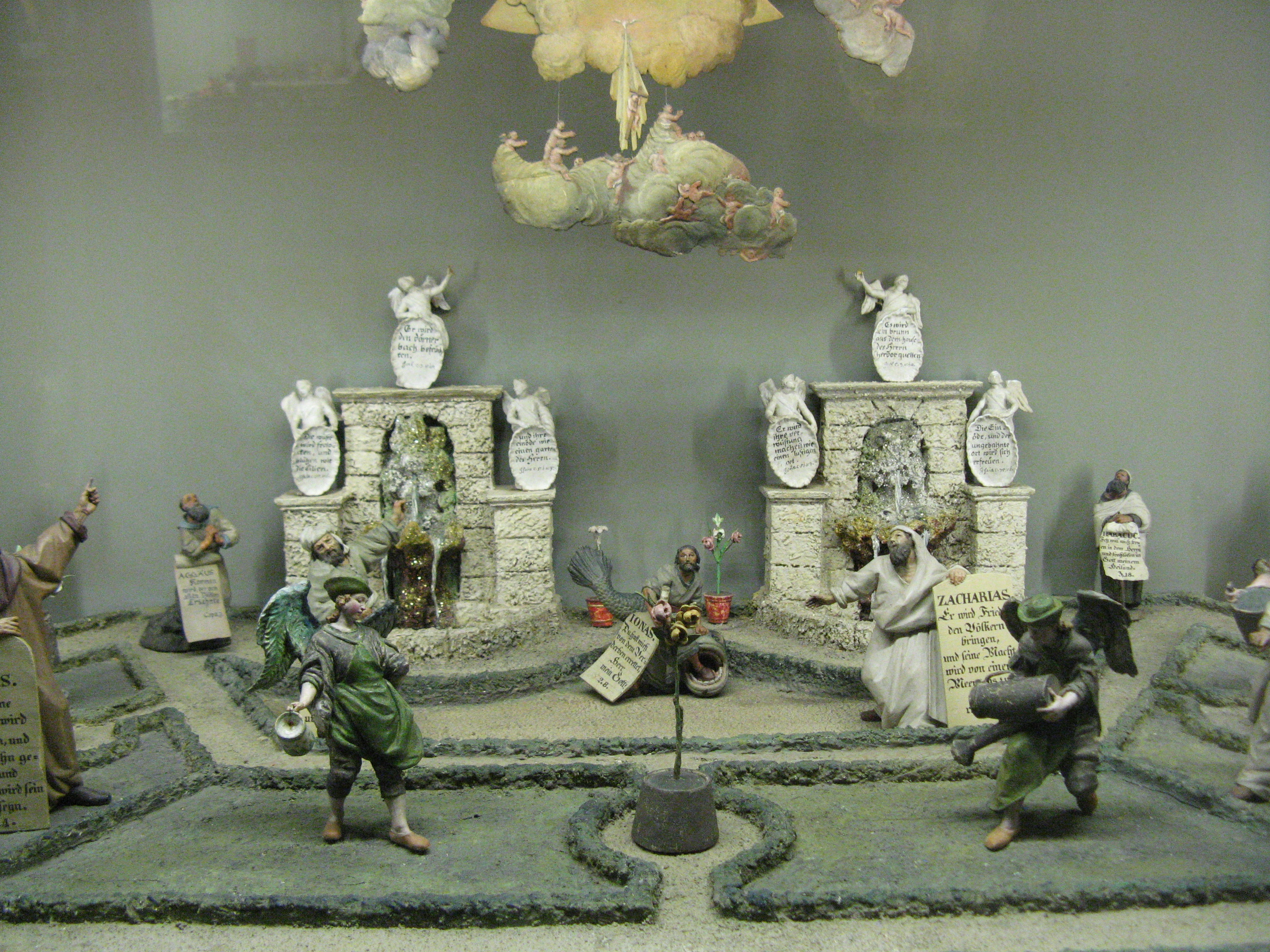 Franz Xaver Nissl: Prophetengarten (1794), Krippenmuseum Brixen